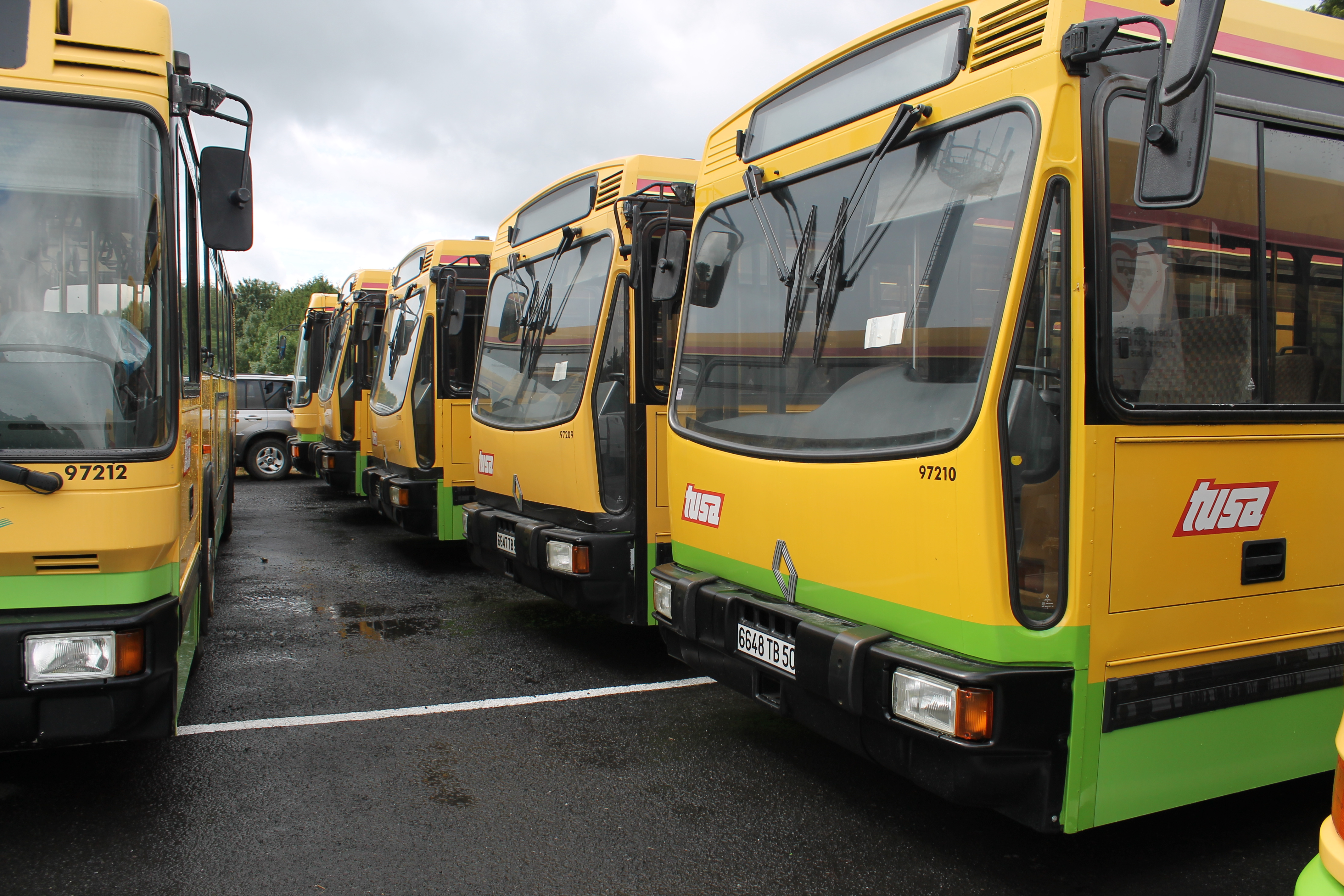 Renault PR 100.2 & PR 112 - TUSA